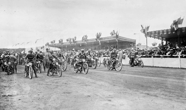 Départ de la course 500cc3 au 2ème Grand Prix de l'U.M.F. en 1921 sur le circuit de la Sarthe.